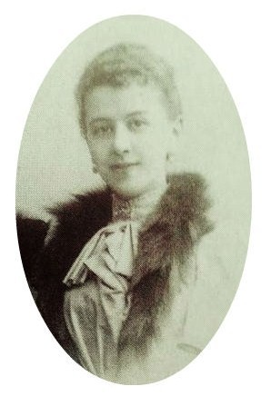 Елизавета Карловна Столыпина (1852—1939), урожд. баронесса Пилар фон Пильхау, во втором браке Шувалова.